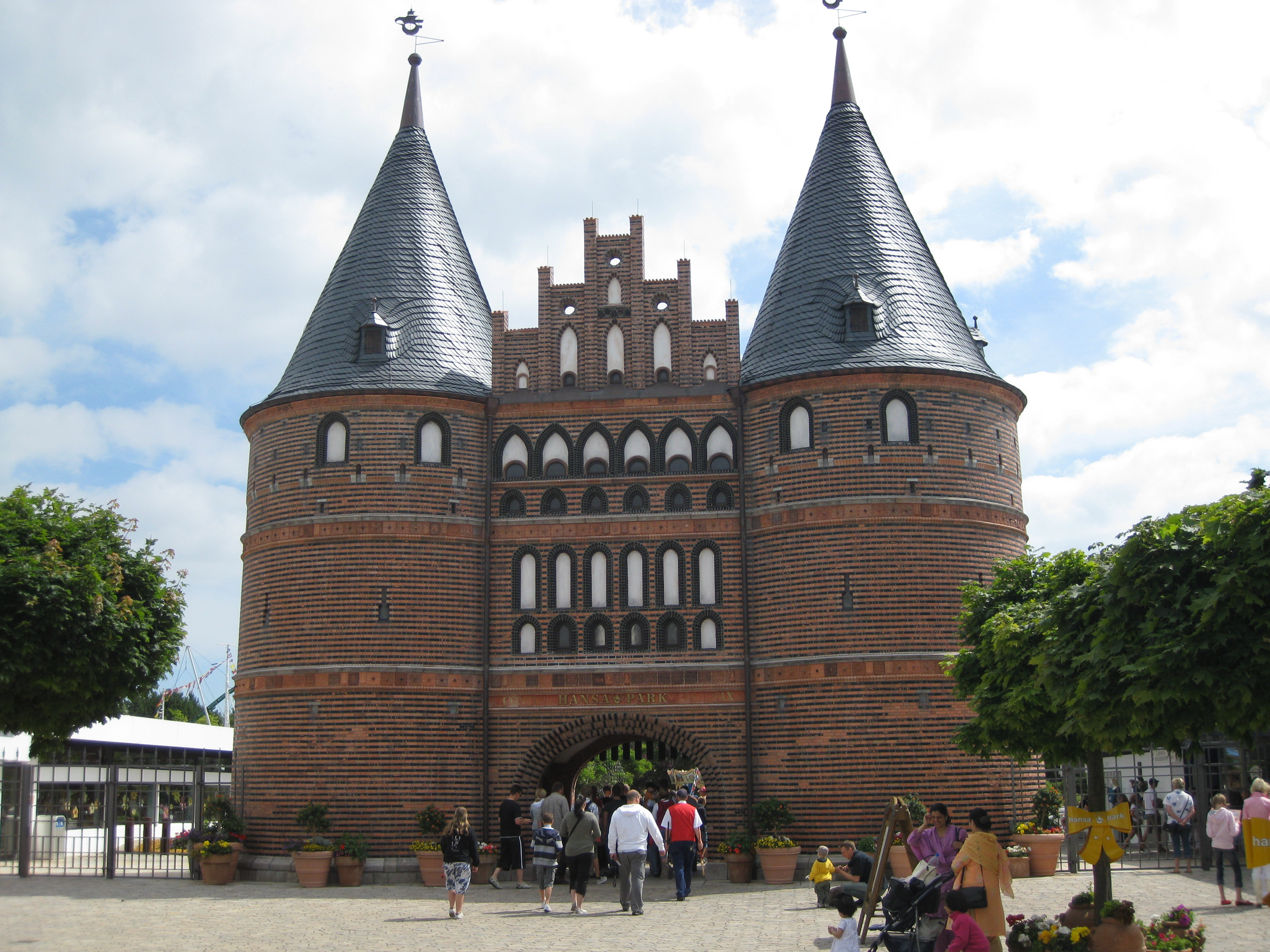 Nachbau des Holstentors im Eingangsbereich des Hansa-Parks in Sierksdorf, Schleswig-Holstein, Deutschland, aufgenommen von der Fußgängerbrücke vor dem Eingang zum Park. Der Nachbau wurde 2008 fertiggestellt und von Schleswig-Holsteins Ministerpräsident Peter Harry Carstensen eingeweiht